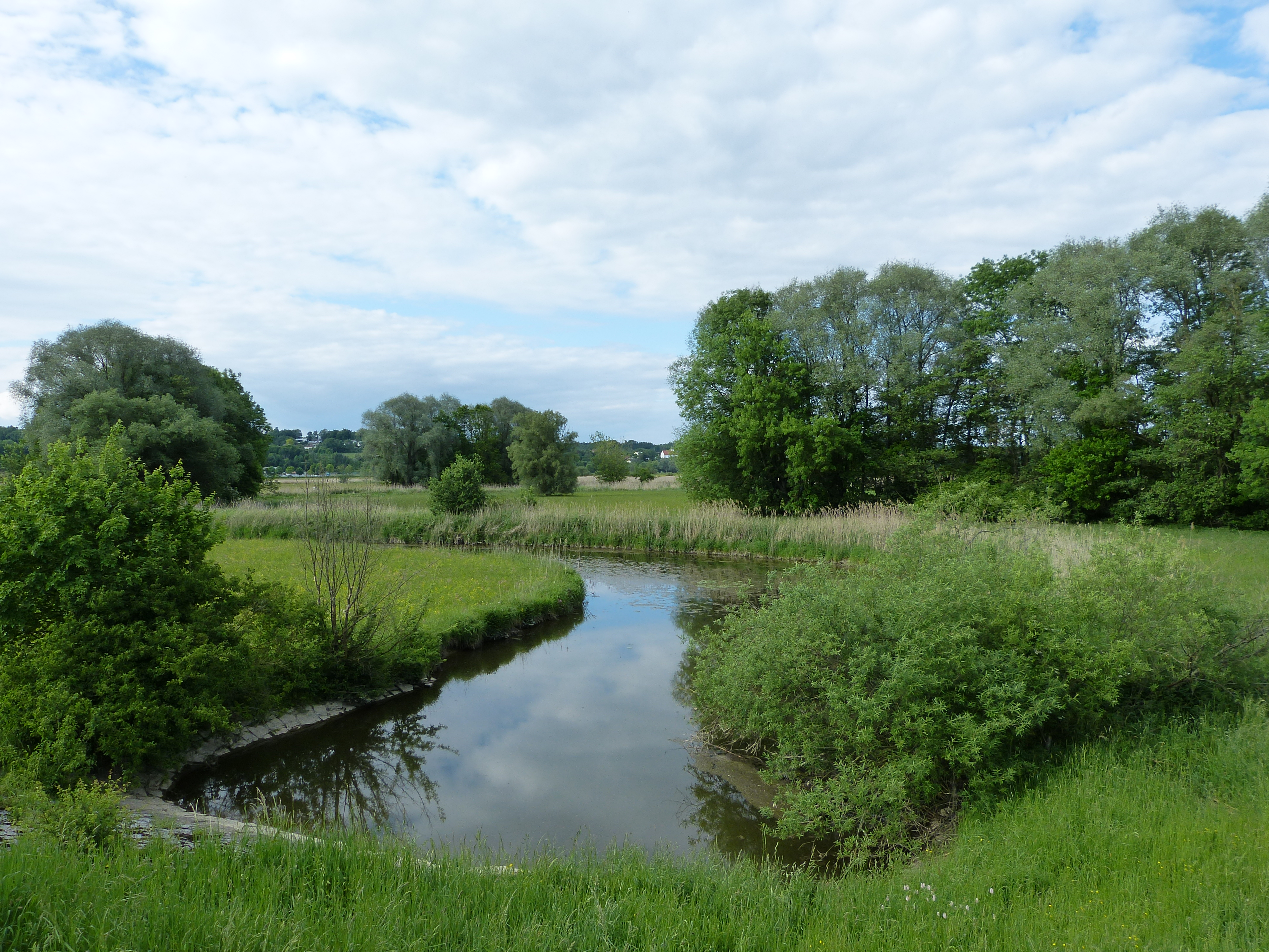 Marklkofen / NSG-00220.01 / WDPA:166061 Vilsschleife im Naturschutzgebiet